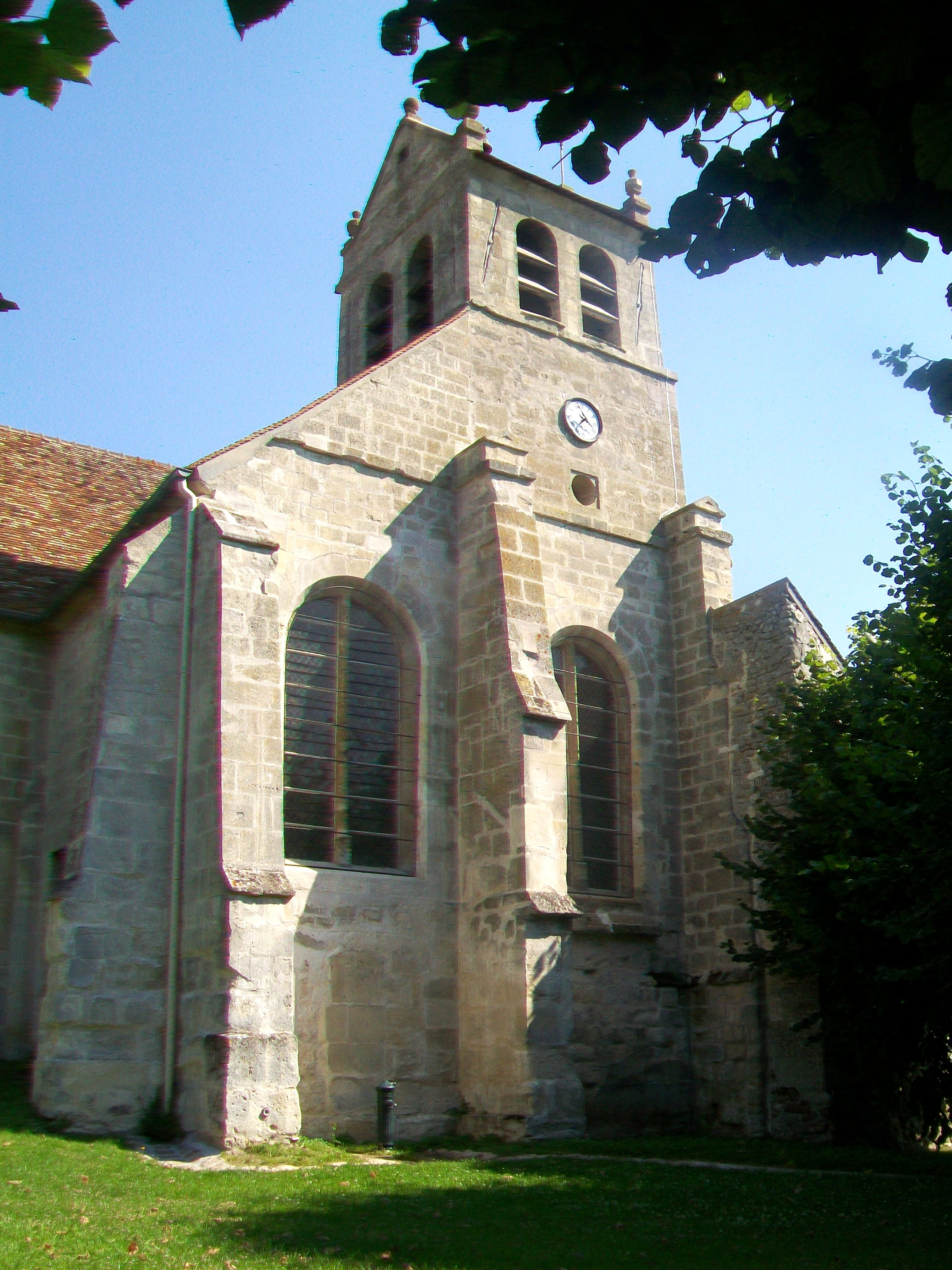 Façade du transept sud.